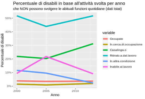 Grafico realizzato con dati Istat tramite il programma RStudio